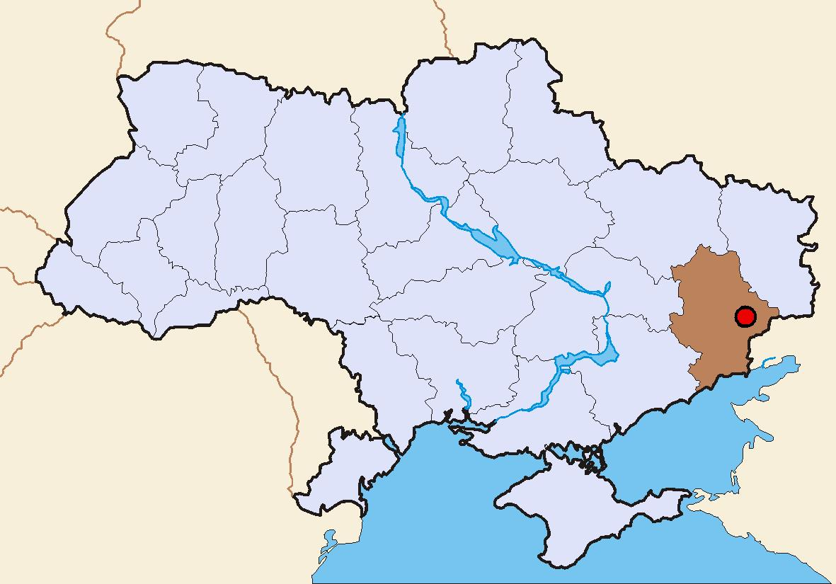 Bigger dot